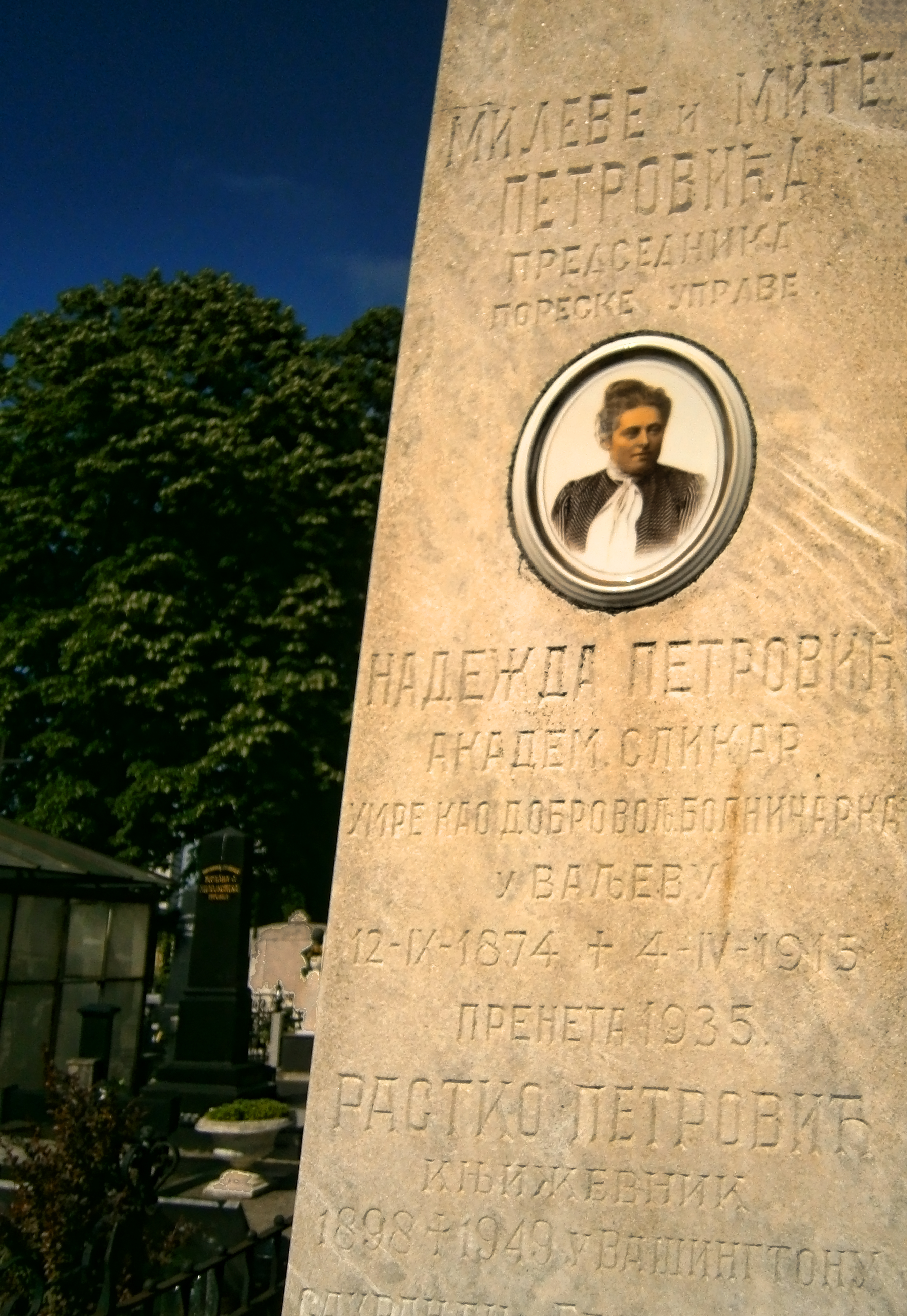 Na Novom Groblju u Beogradu su prenete i sahranjene kosti naše slikarke Nadežde Petrović, kao i njenog mlađeg brata, književnika Rastka Petrovića.